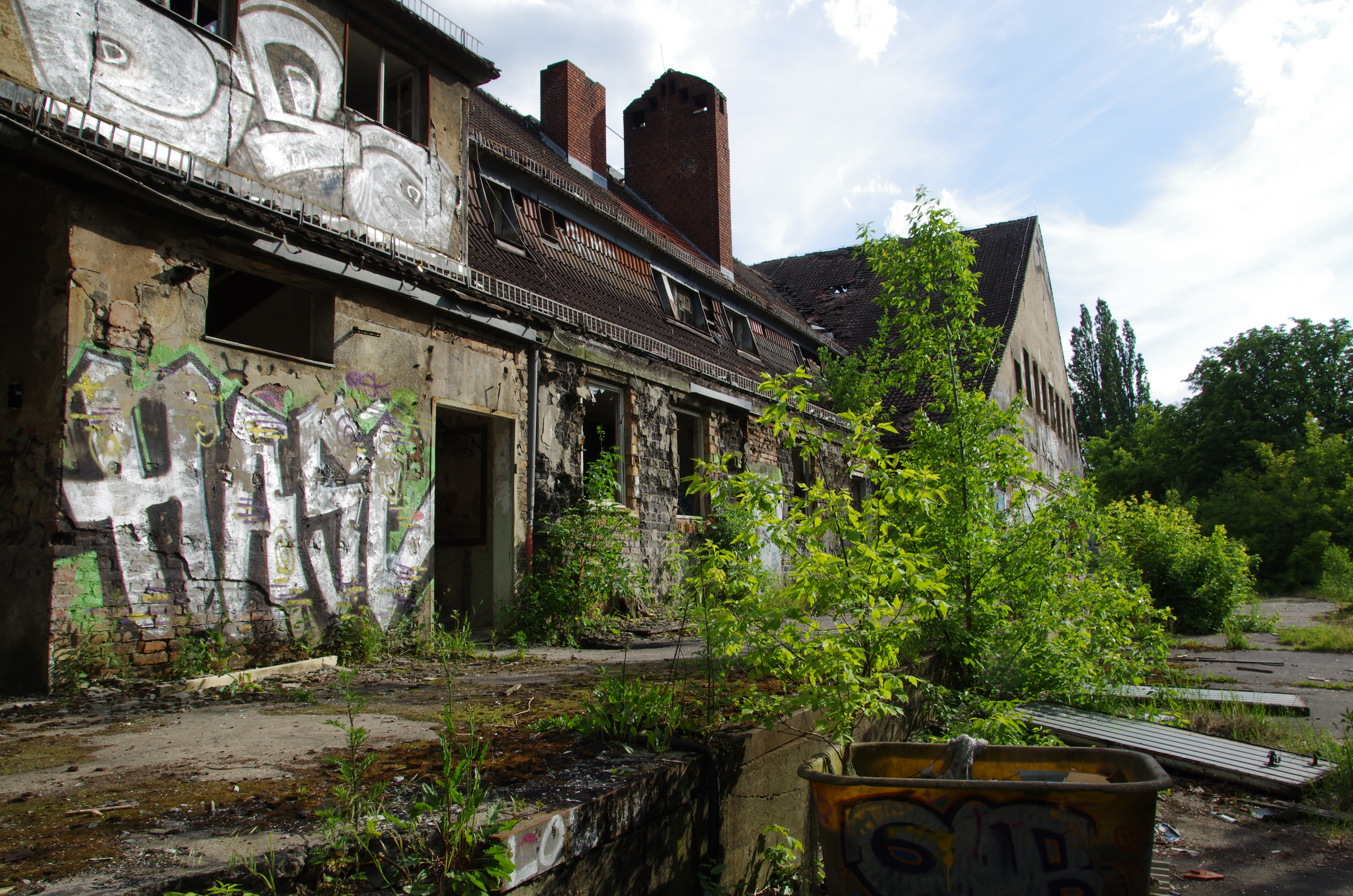 Säuglingskrankenhaus in Weißensee. Verlassenes Säuglings- und Kinderkrankenhaus in Weißensee